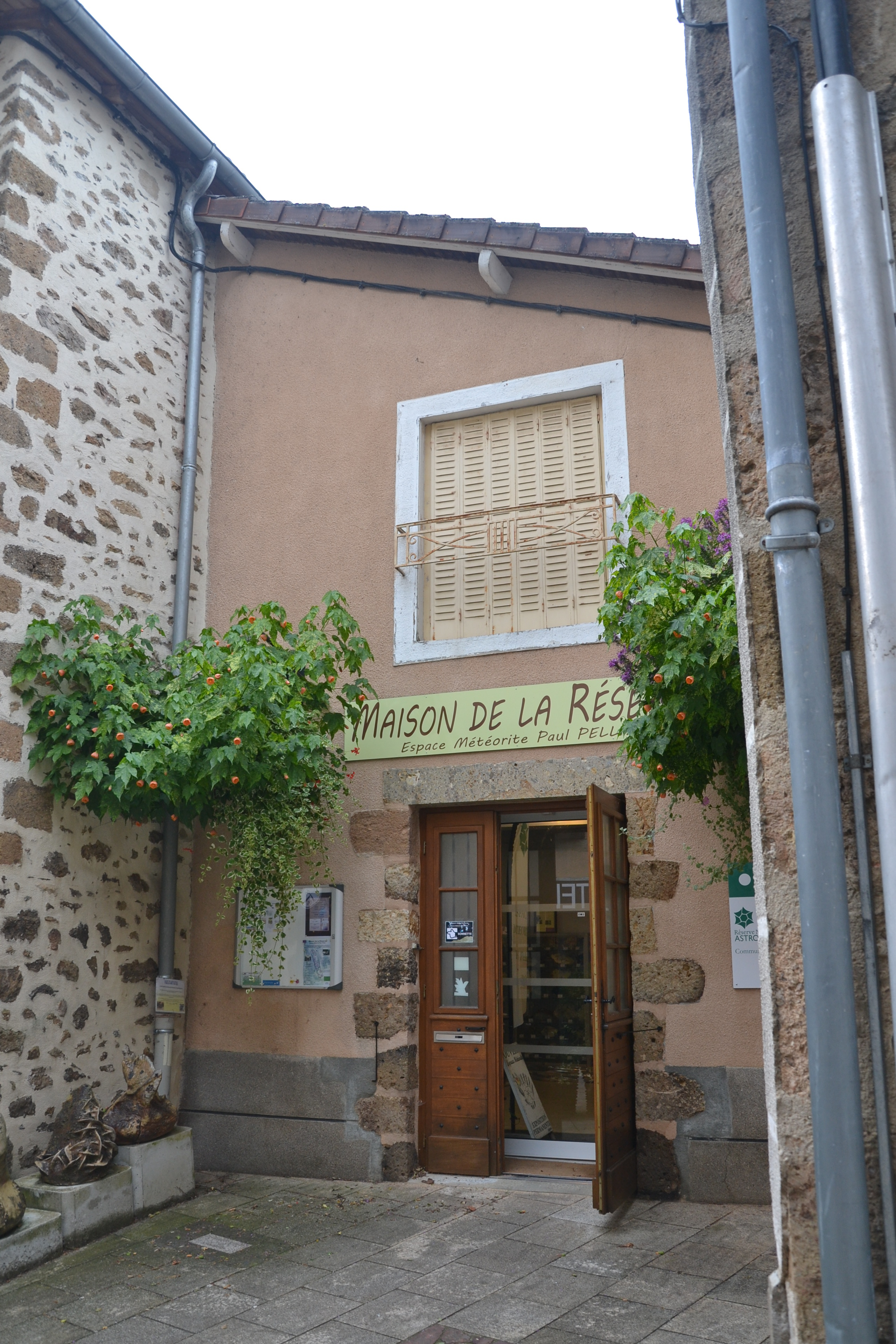 Espace muséographique de la météorite de Rochechouart - Maison de la Réserve naturelle nationale (Haute-Vienne, France).